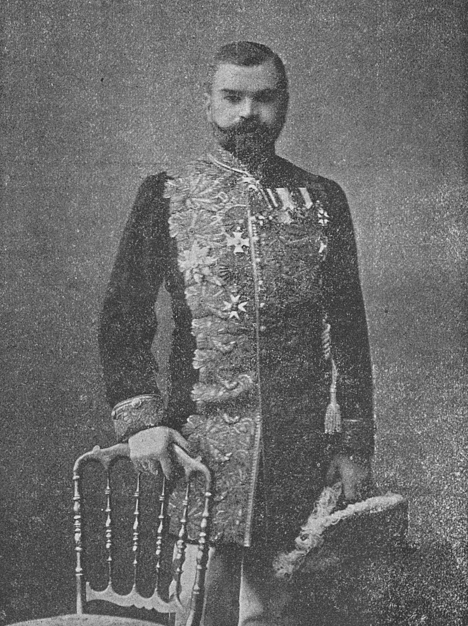 Аляксей Фёдаравіч Гірс